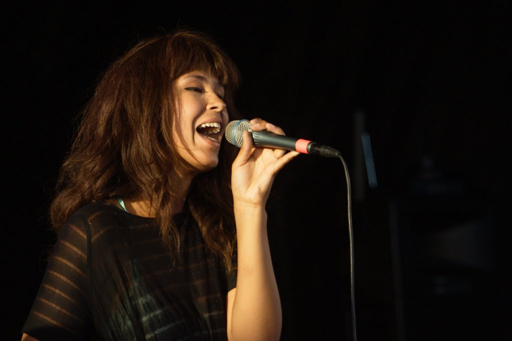 Maria Mena synger, Begivenheter Sommerfest in Giske, Norway